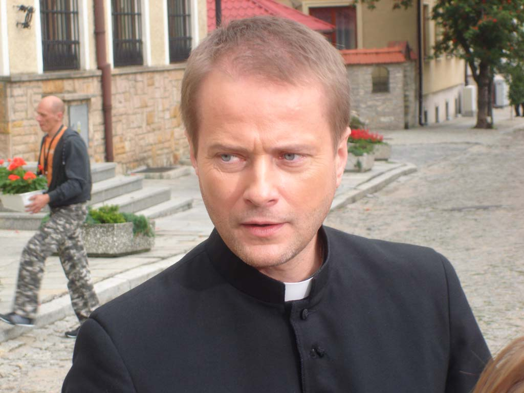 Artur Żmijewski - ksiądz Mateusz